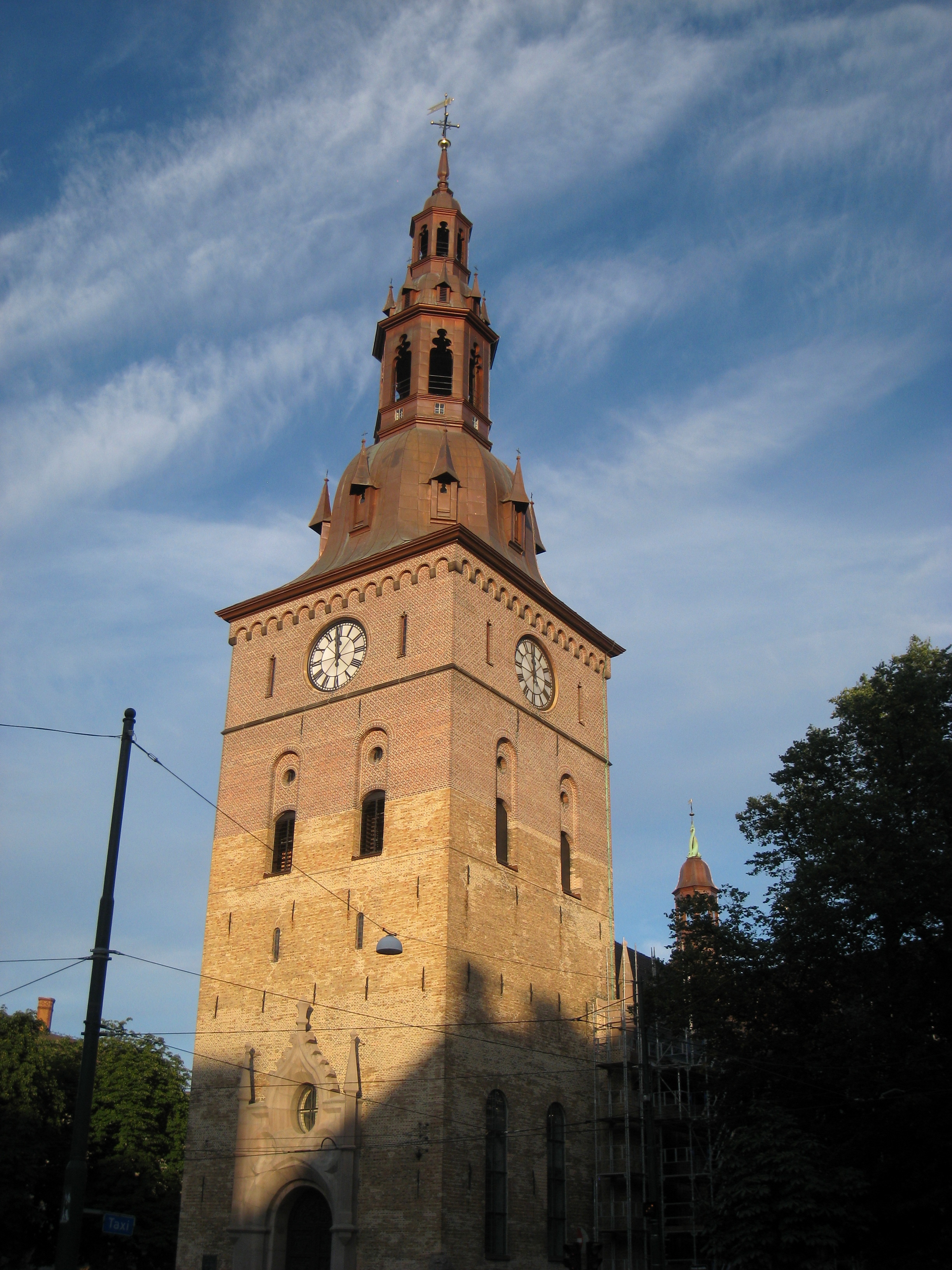 Oslo Domkirke, Oslo, Norway.